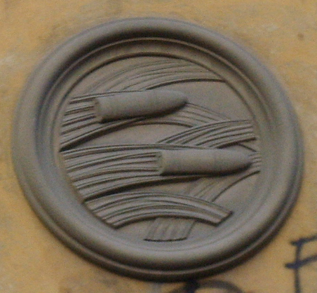 Casa del mutilato firenze medaglione 05